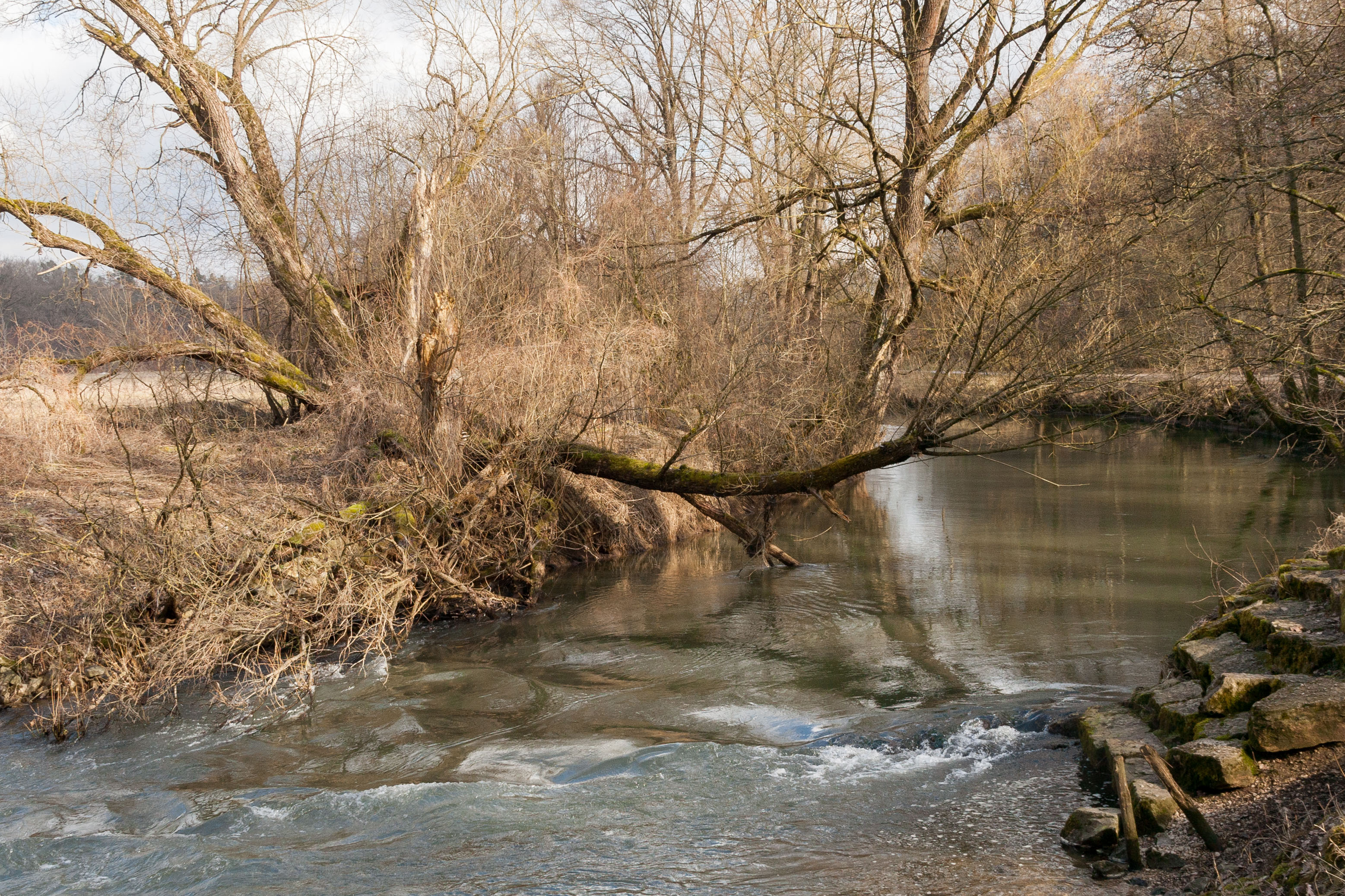 Pegnitz, Nürnberg, Landschaftsschutzgebiet